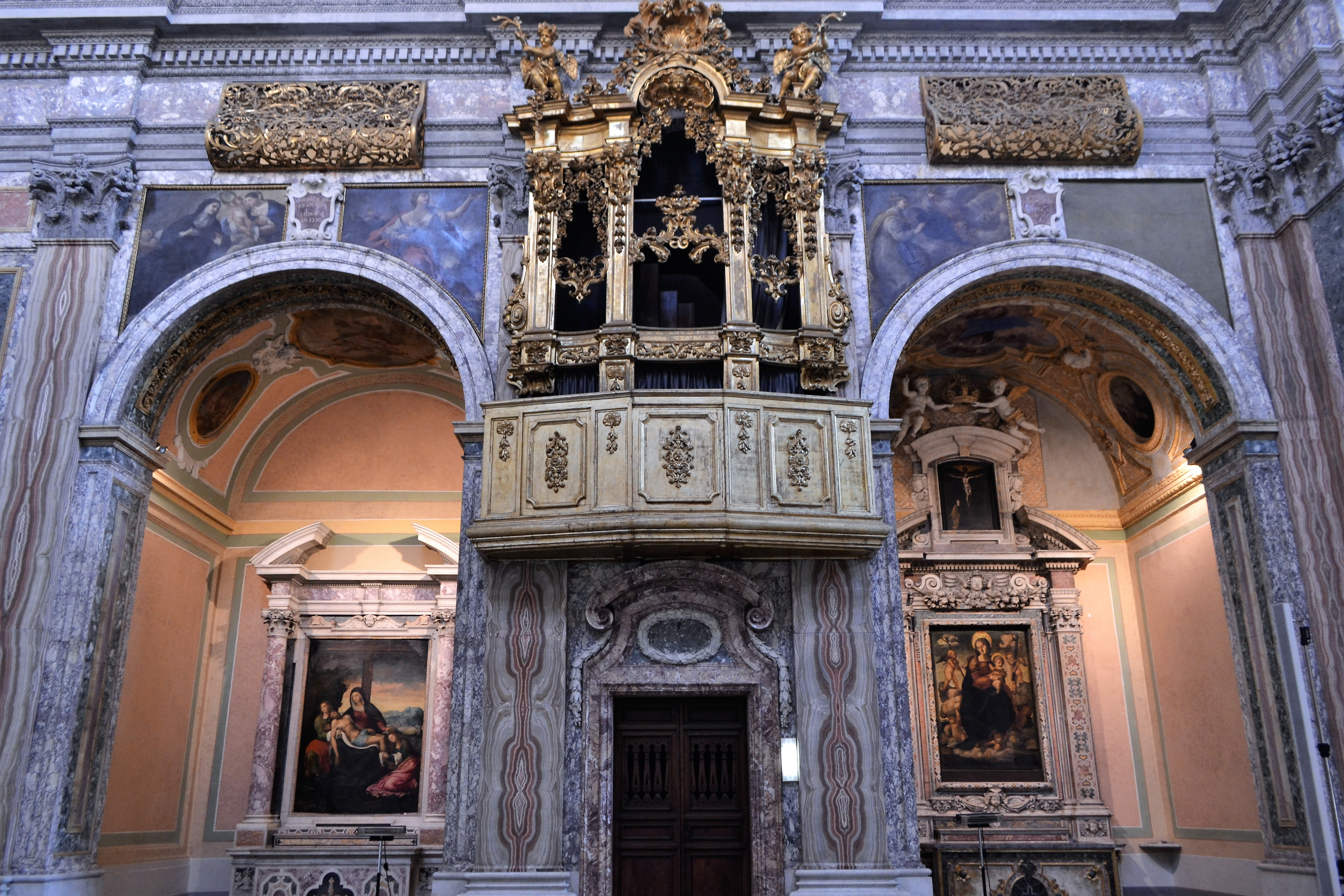 Chiesa dei Santi Marcellino e Festo di Napoli - Cappelle laterali